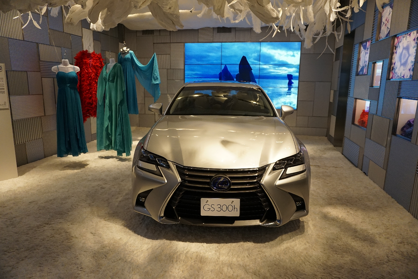 LEXUS GS300h(2015model) フロント INTERSECT by LEXUS TOKYOで撮影